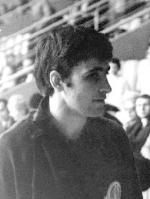 Raycho Khristov